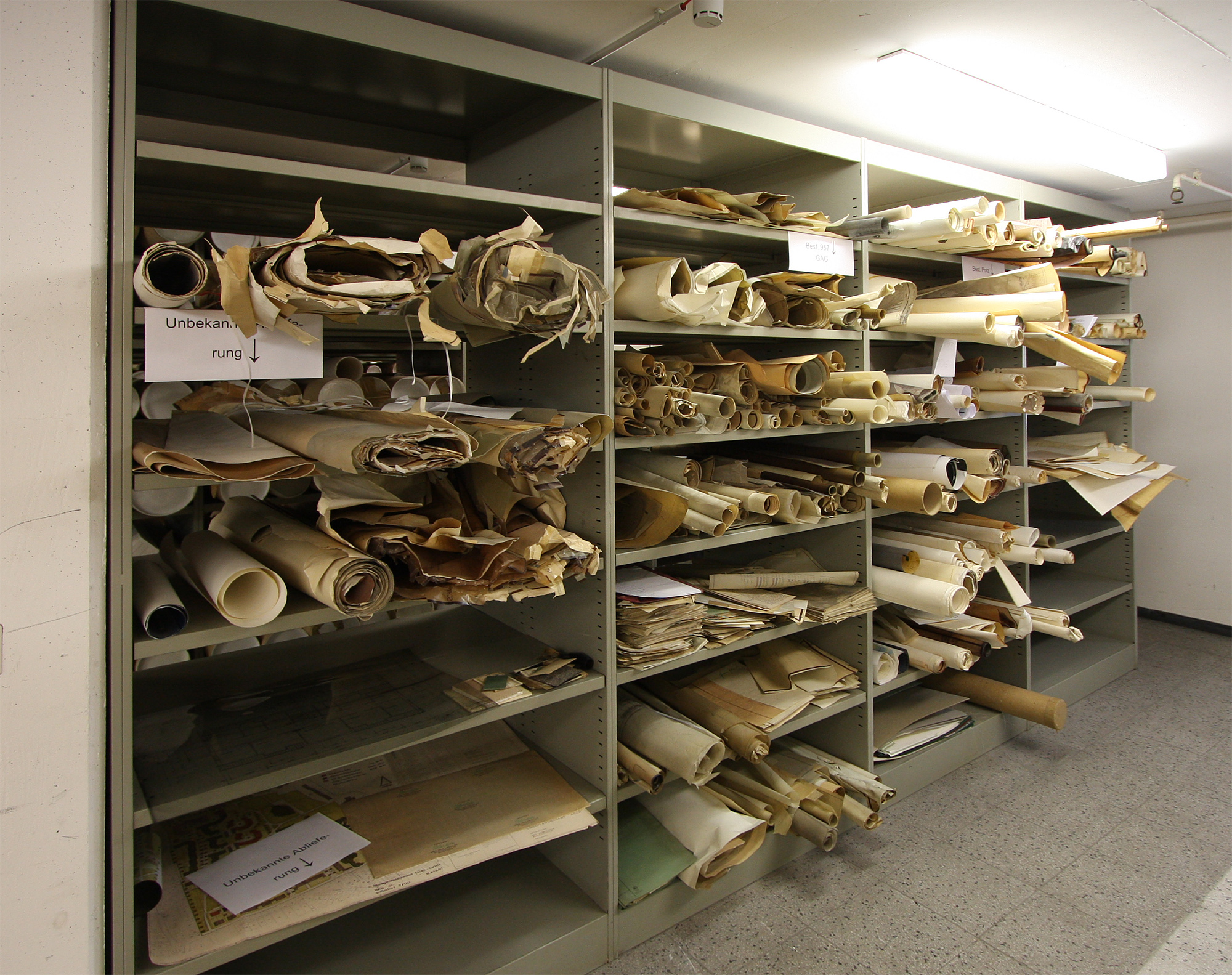 Historisches Archiv der Stadt Köln, Detail im Magazinraum Severinsstraße